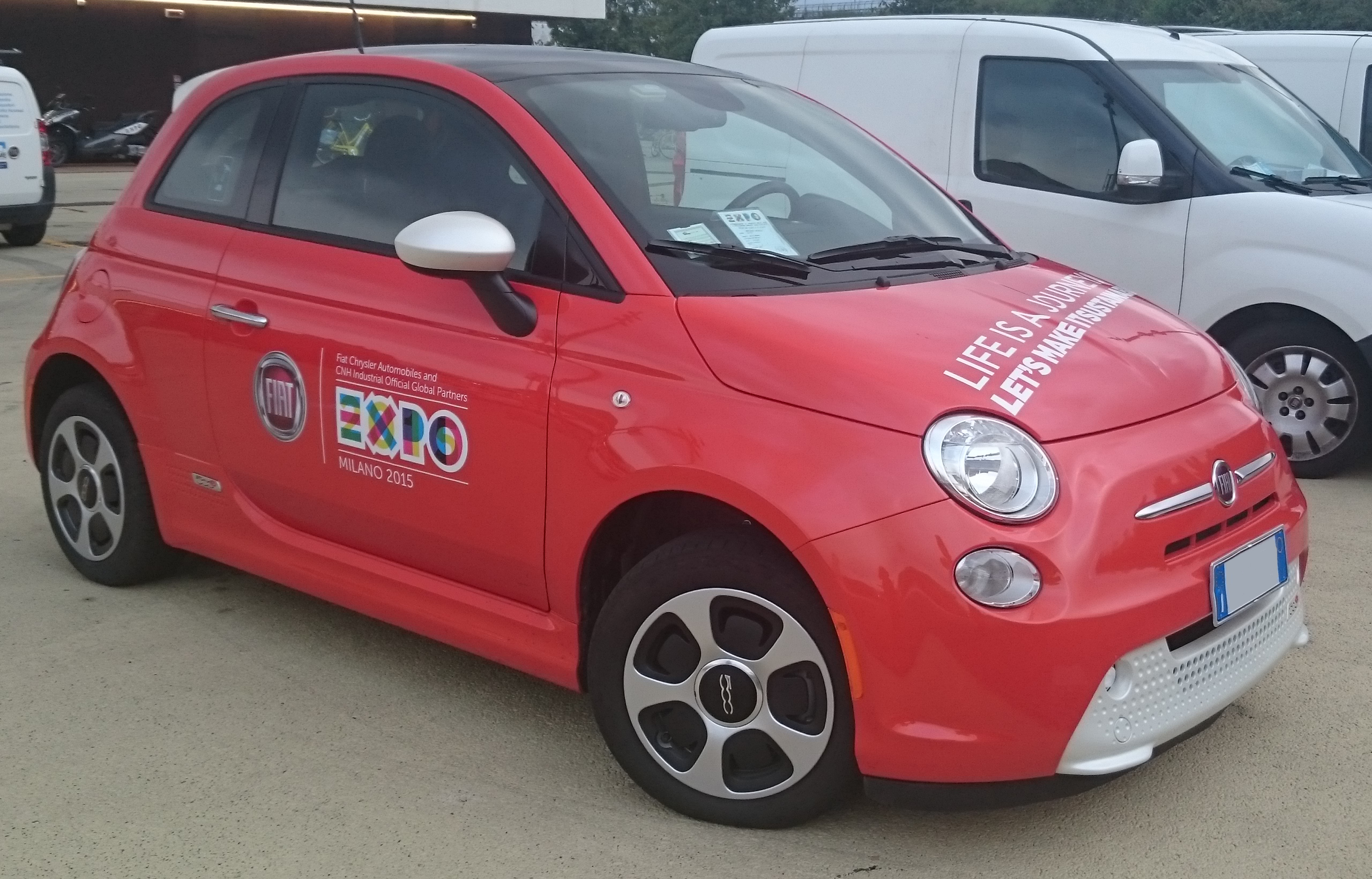 Fiat 500e all'Esposizione universale EXPO MILANO 2015